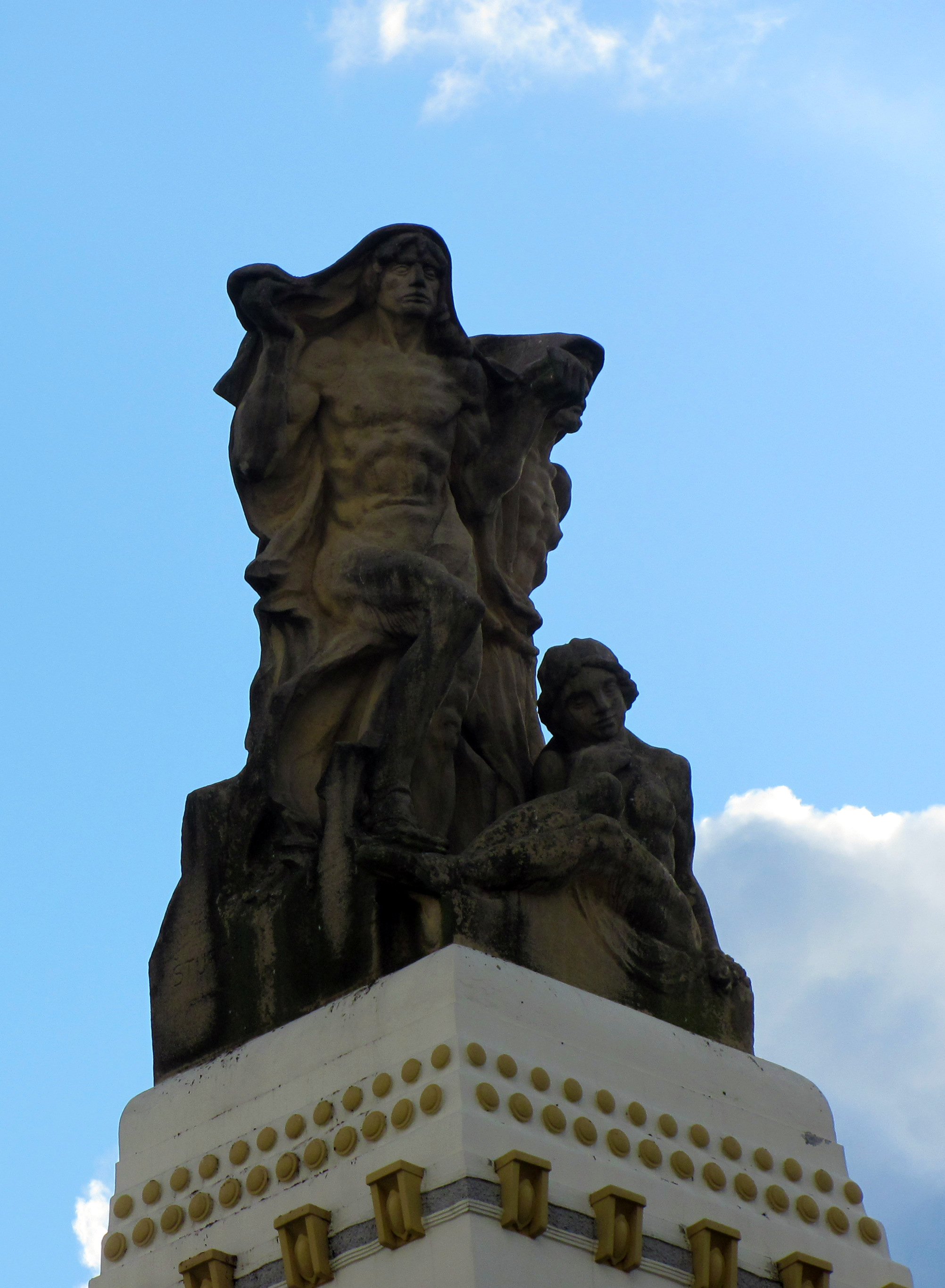 Sousoší Jana Štursy Probuzení národa na pylónu průčelí Městského divadla Mladá Boleslav